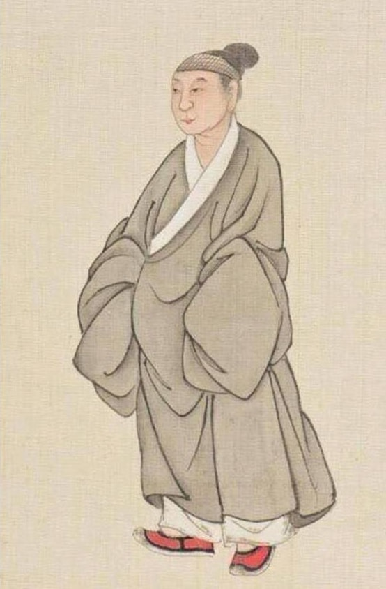 皇淸職貢圖之廣南國夷官。乾隆年間金正中（？-1793）就這樣記載和他們壹起到北京朝覲的琉球和安南使者：“琉球則朝袍廣闊，有古人制度，而以黃帛廣半尺者為帶，緊緊束腰，頭上又以黃色綾裁作一帕，如我東之襆頭而小異處，人物古雅，言語淳淳，稍無俗野之氣。…安南高髻網布，朝袍角帶，與我國恰似，且所著帽謂之文公冠”。